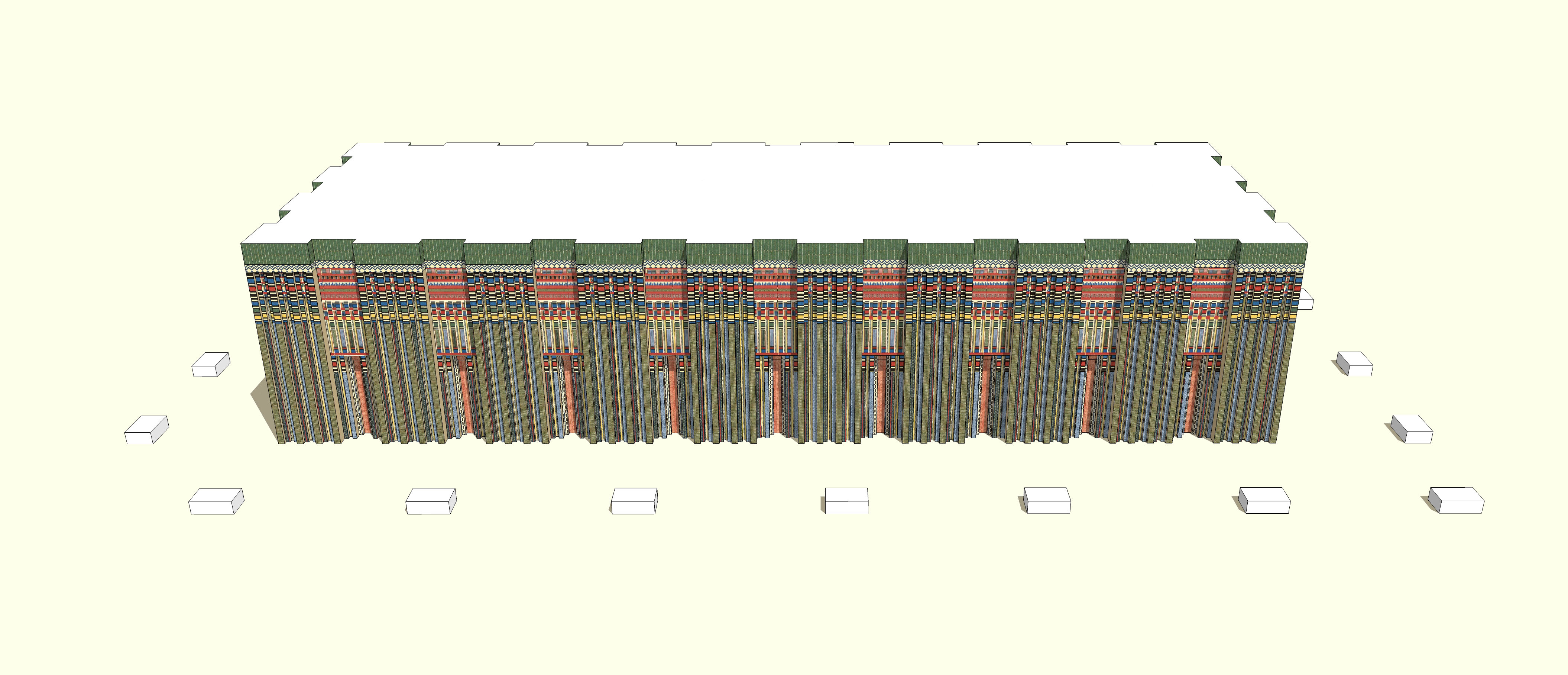 Reconstitution 3D du mastaba S3503 de Saqqarah (d'après les plans effectués par W. B. emery, "Great Tombs of the First Dynasty", II, 1954, pl. XXXVIII)